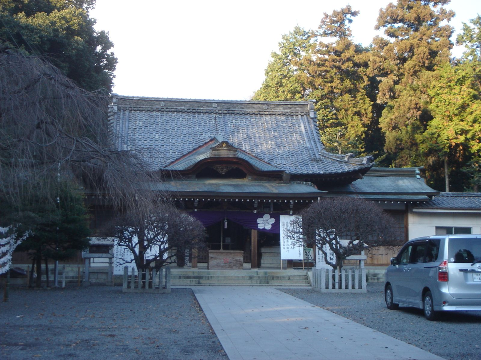 Nagara tenjin jinja(Shrine)(長良天神神社、拝殿),Gifu,Gifu,Japan(岐阜県岐阜市)で撮影。